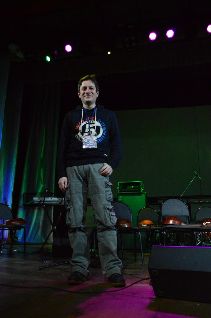 Бессменный участник всех фестивалей, сначала как музыкант, потом как ведущий и член жюри Антон Мизонов, группа Default City (г. Москва).